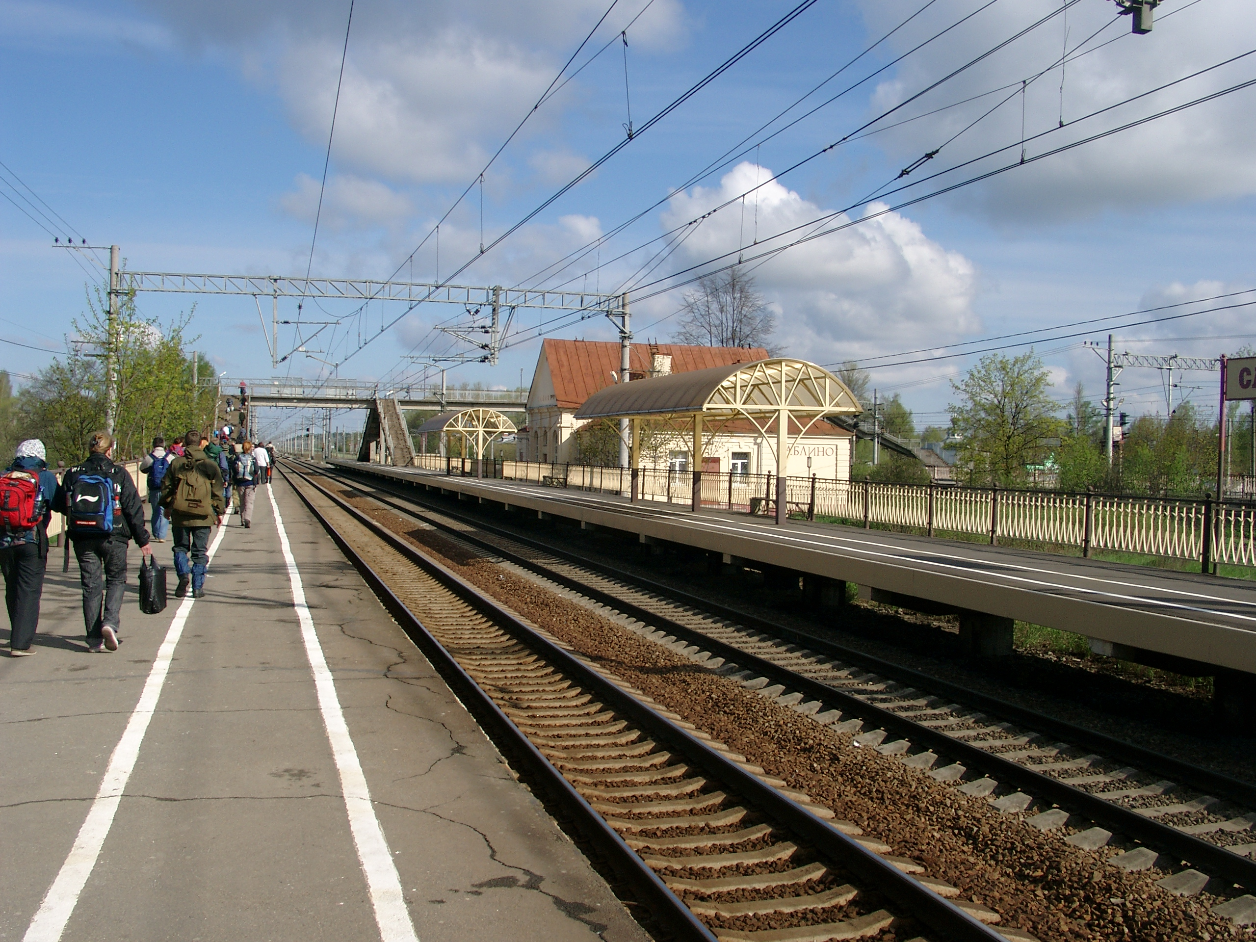 Железнодорожная станция Саблино, Тосненский район Ленинградской области. Общий вид станции.